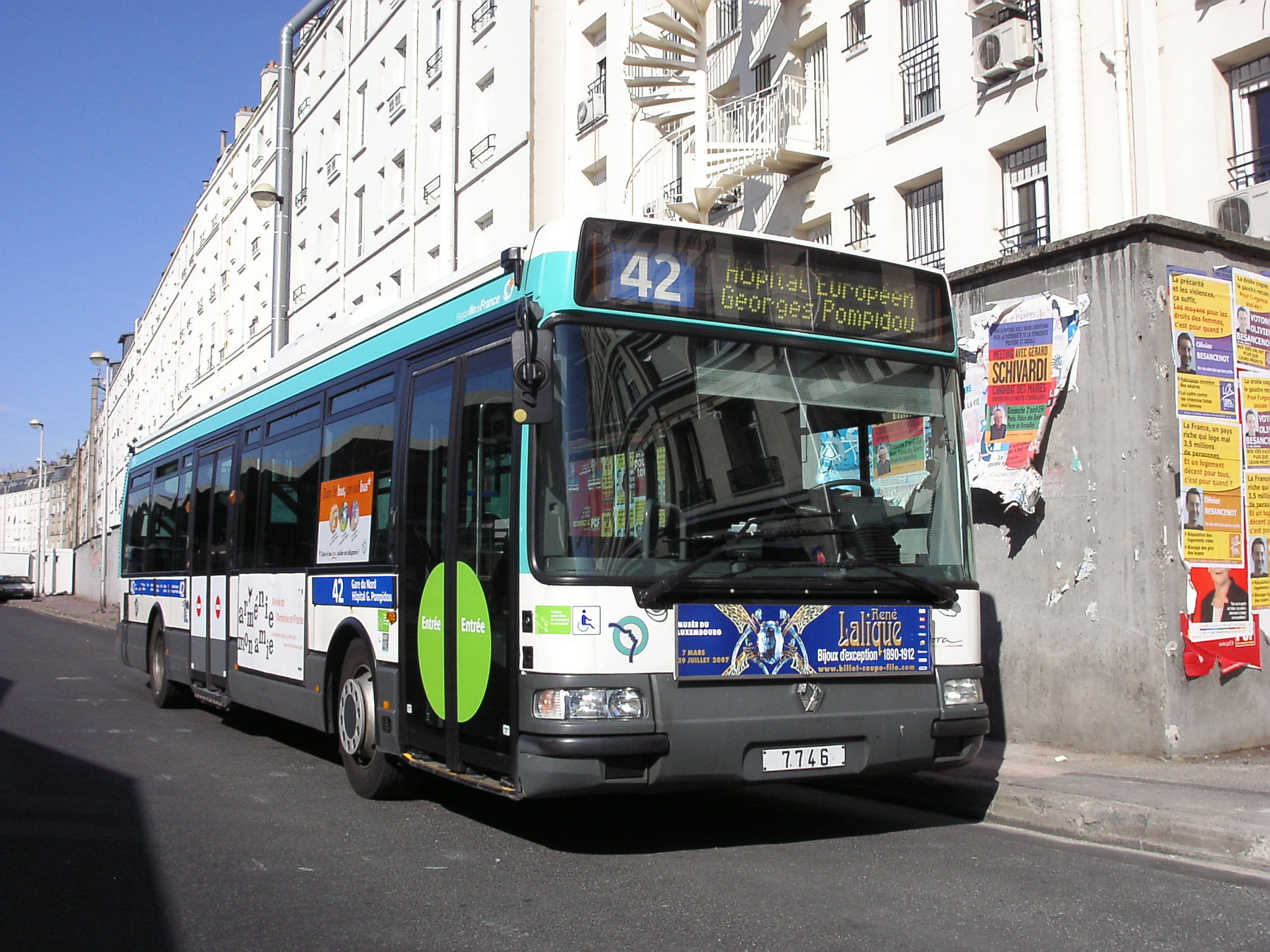 Bus RATP Gare du Nord Ligne 42_Paris_France